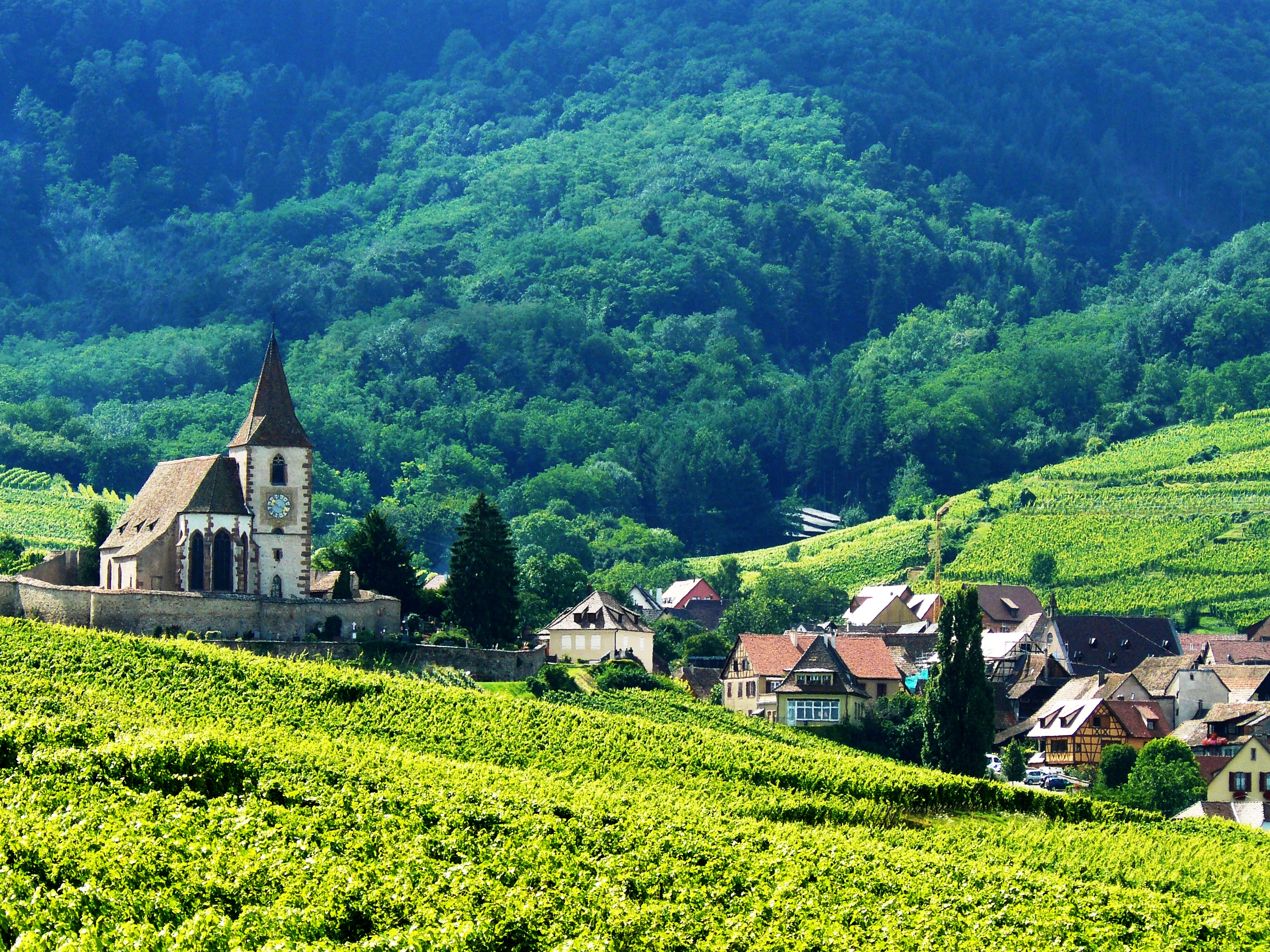 L'église d'Hunawihr et une partie du village entouré de vignes